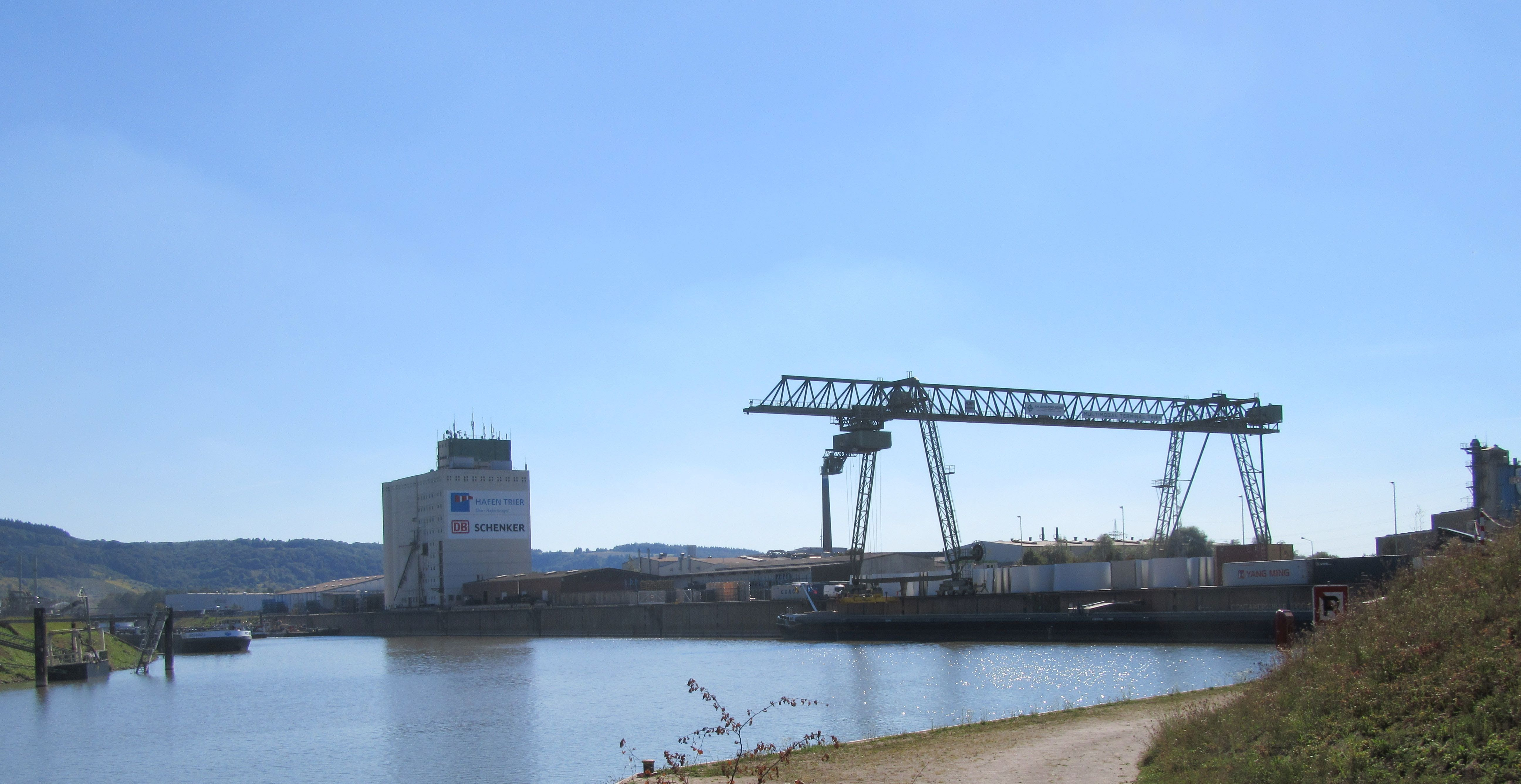 Hafen Trier